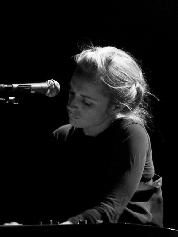 Agnes Caroline Thaarup Obel (Kopenhagen, 28 oktober 1980) is een Deens singer/songwriter.